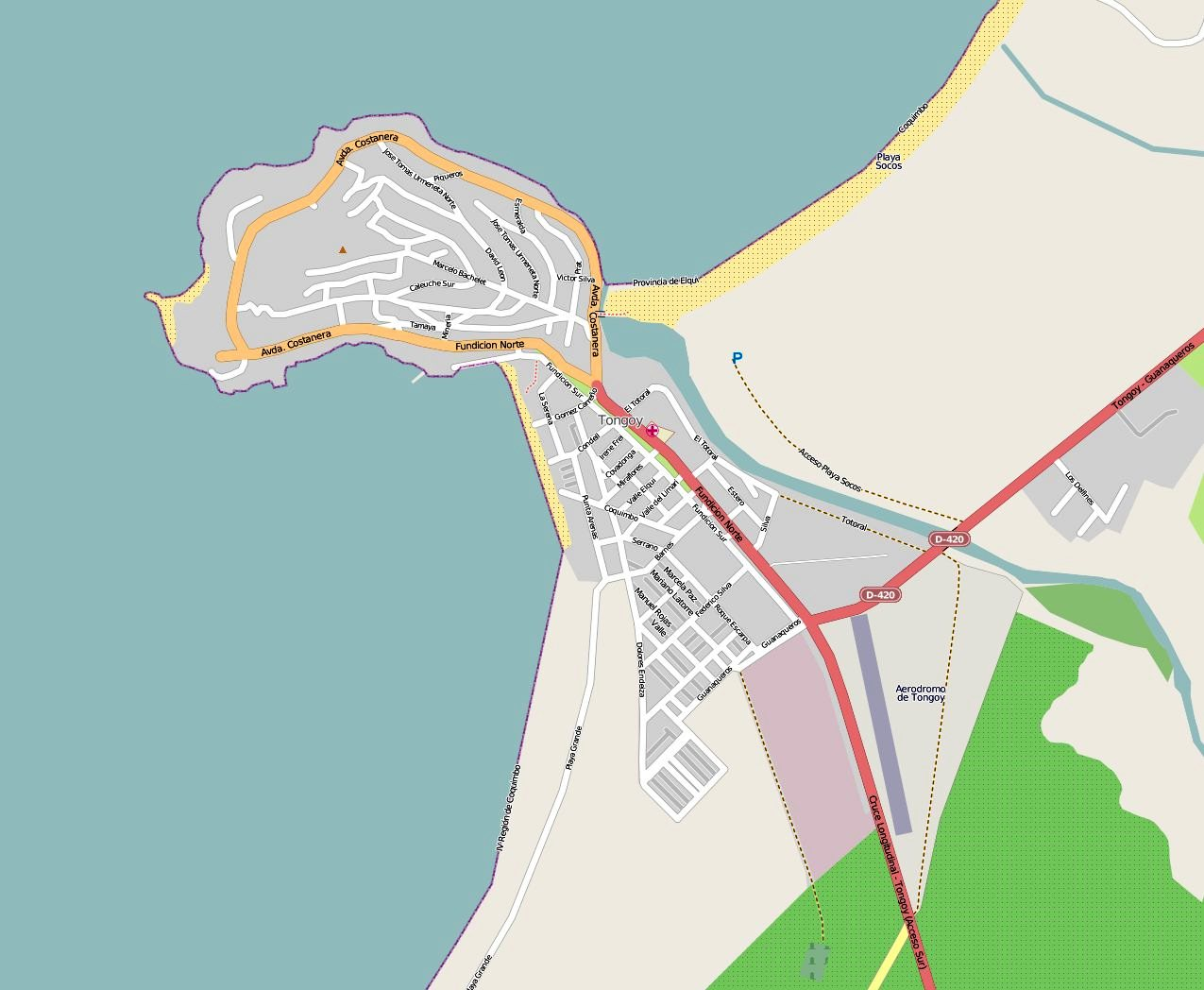 Plano de la localidad de Tongoy, en la Región de Coquimbo, Chile. Creado con OpenStreetMap.